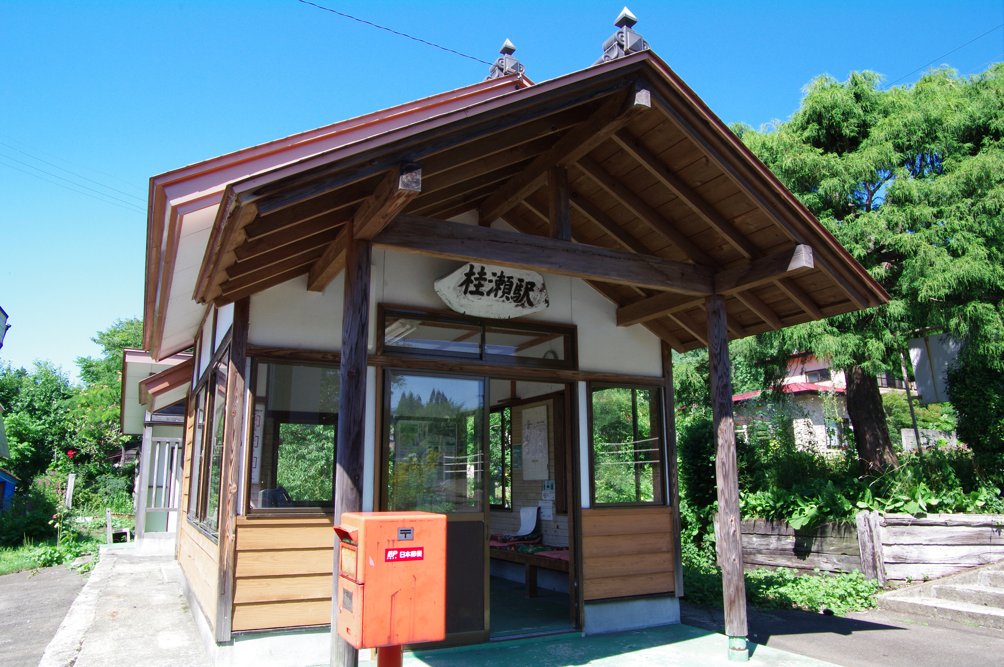 Katsurase Station (桂瀬駅)